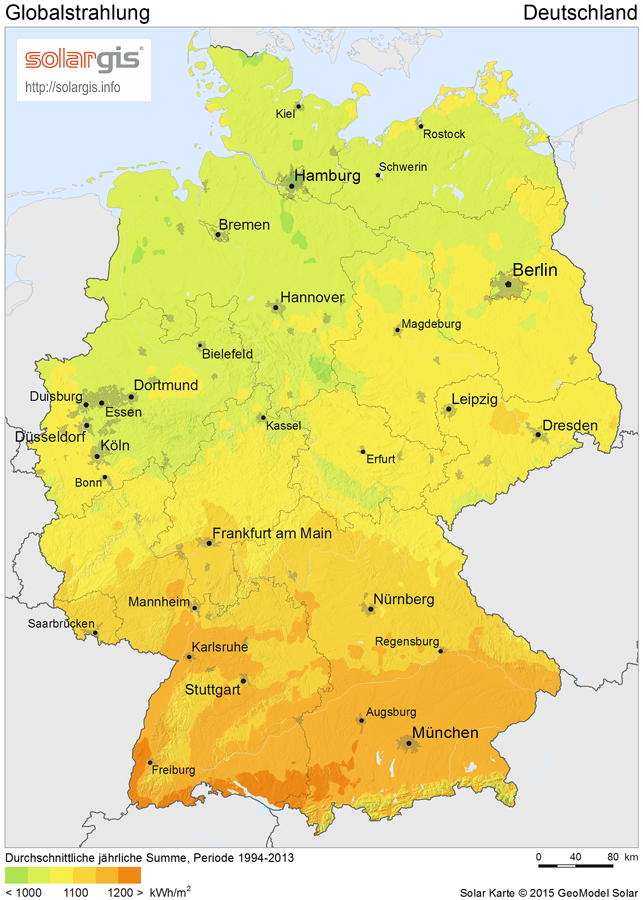 Solar Radiation Map: Globalstrahlung Deutschland, SolarGIS 2011